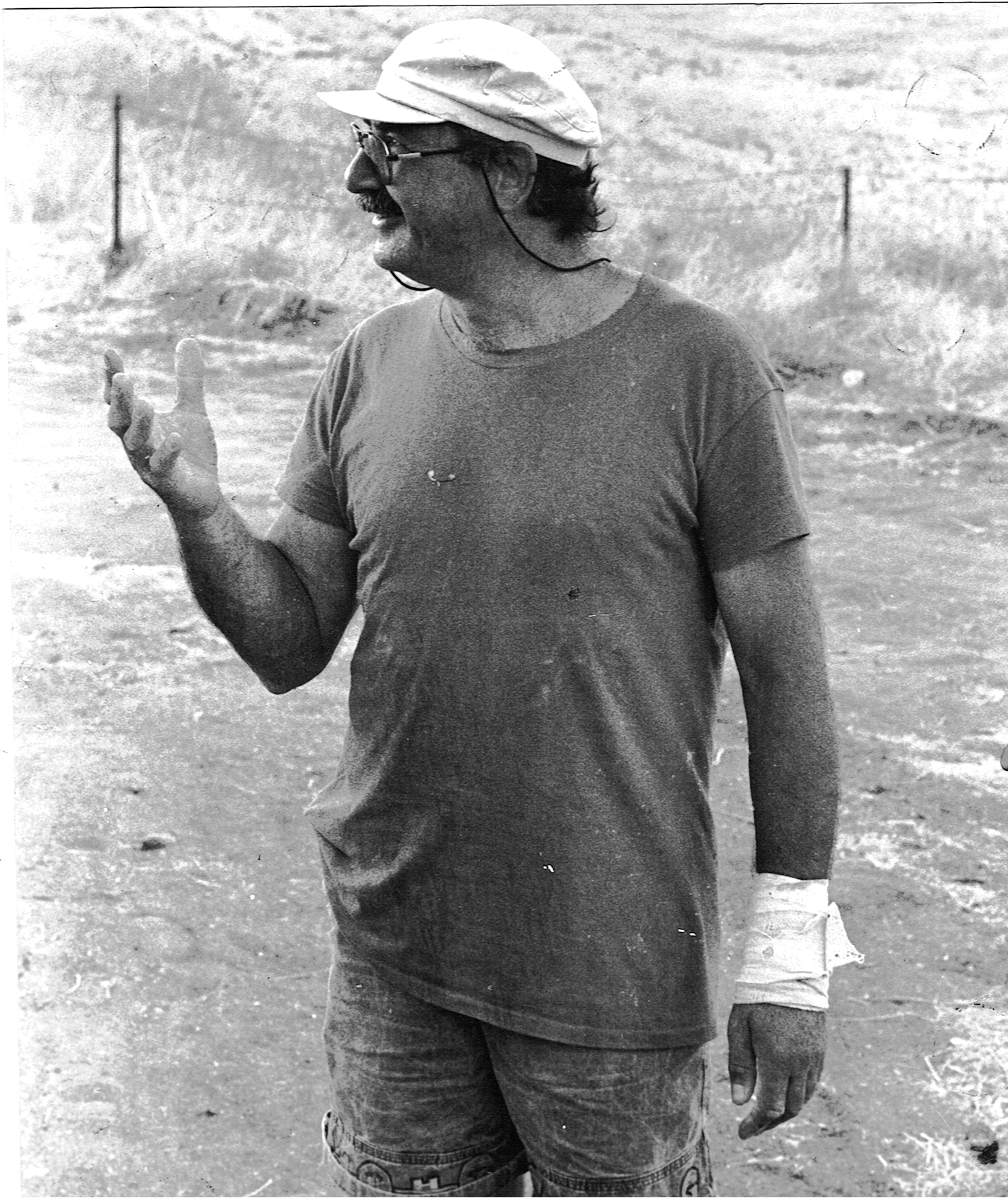 תמונה מאלבום משפחתי